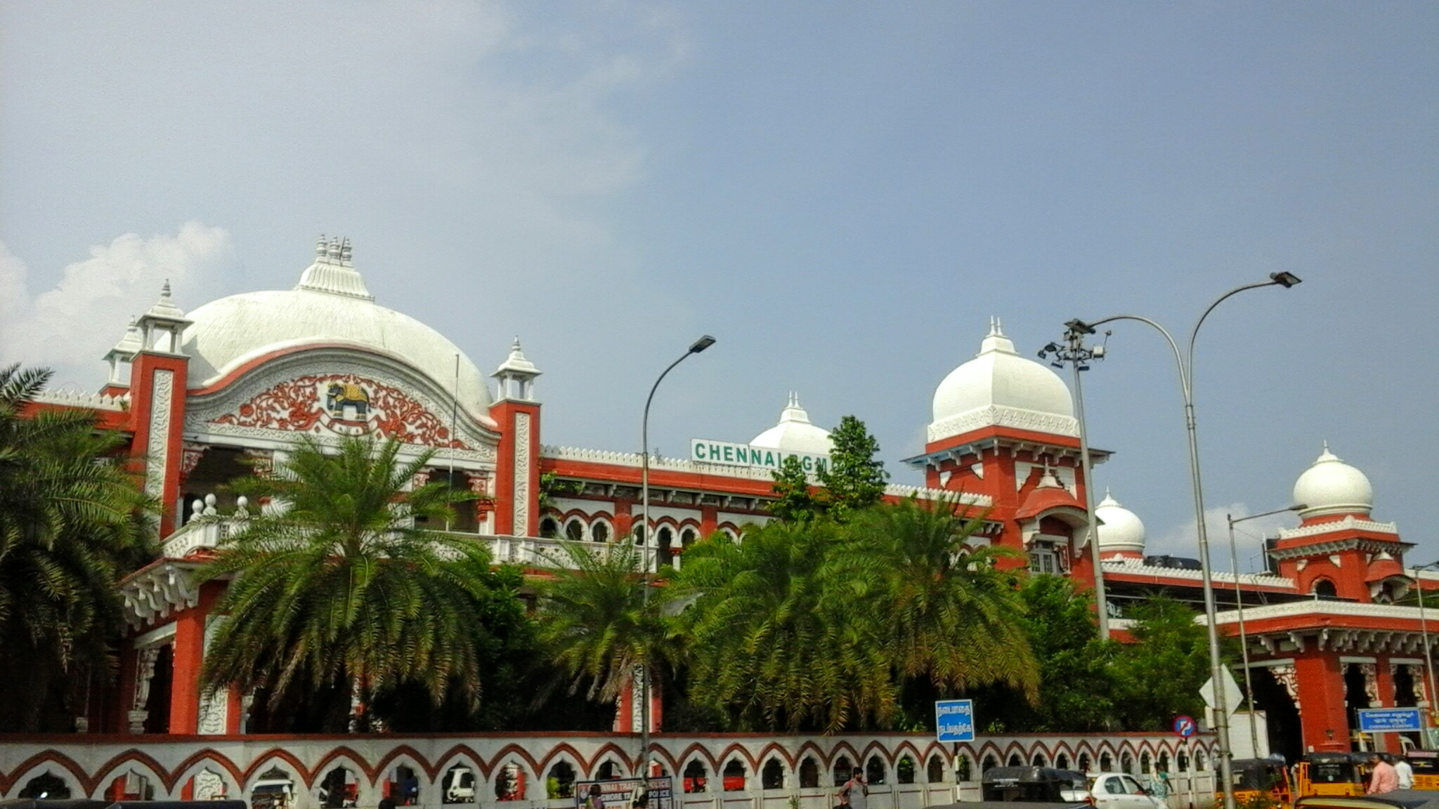 சென்னை எழும்பூர் இரயில் நிலையத்தில் எடுக்கப்பட்ட புகைப்படம்